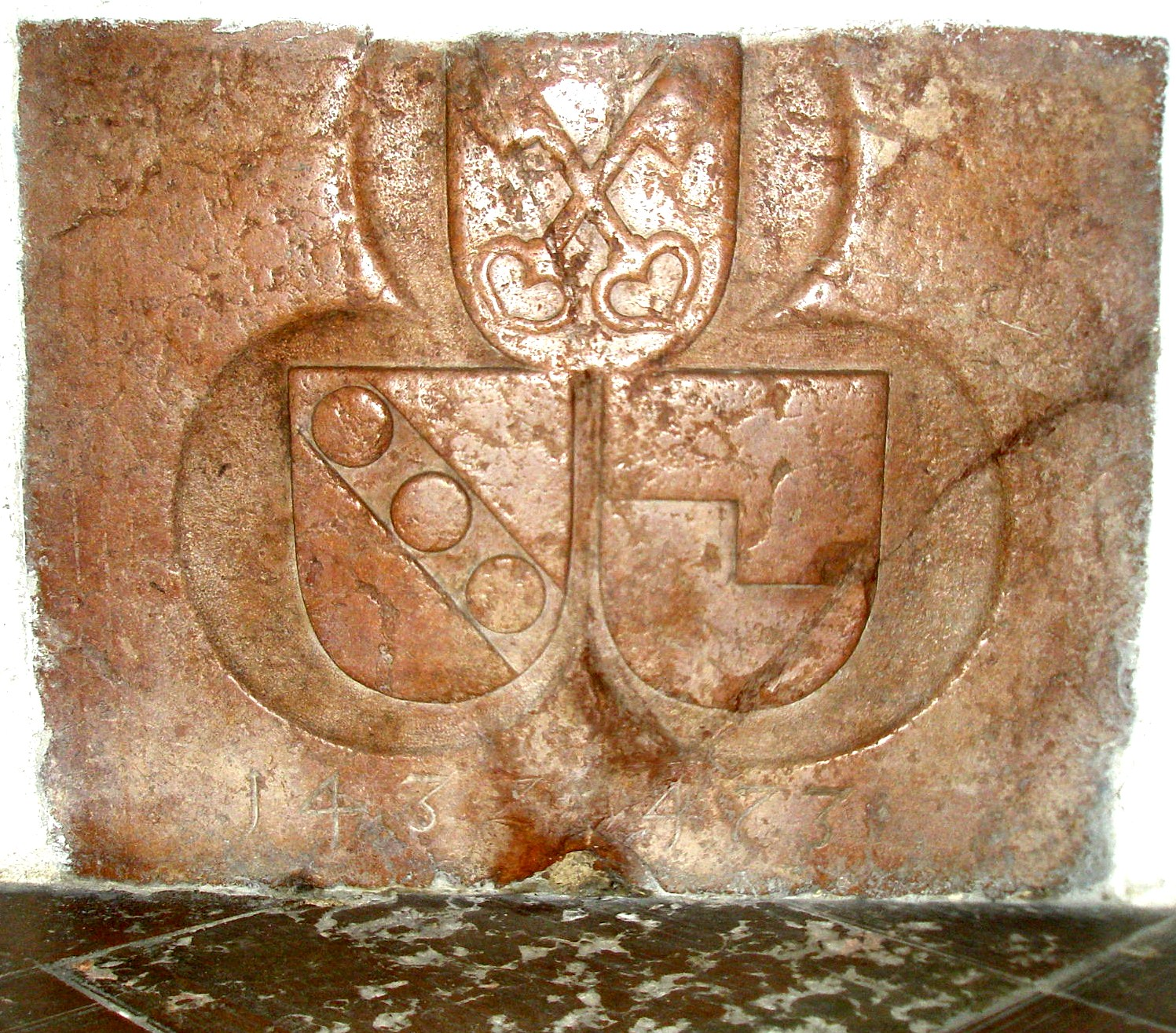 Wappentafel der Gruft der Stiftspröpste Pinzenauer († 1432) und Leoprechtinger († 1473) in der Stiftskirche Berchtesgaden; siehe auch Todesjahr unterhalb des jeweiligen Wappens